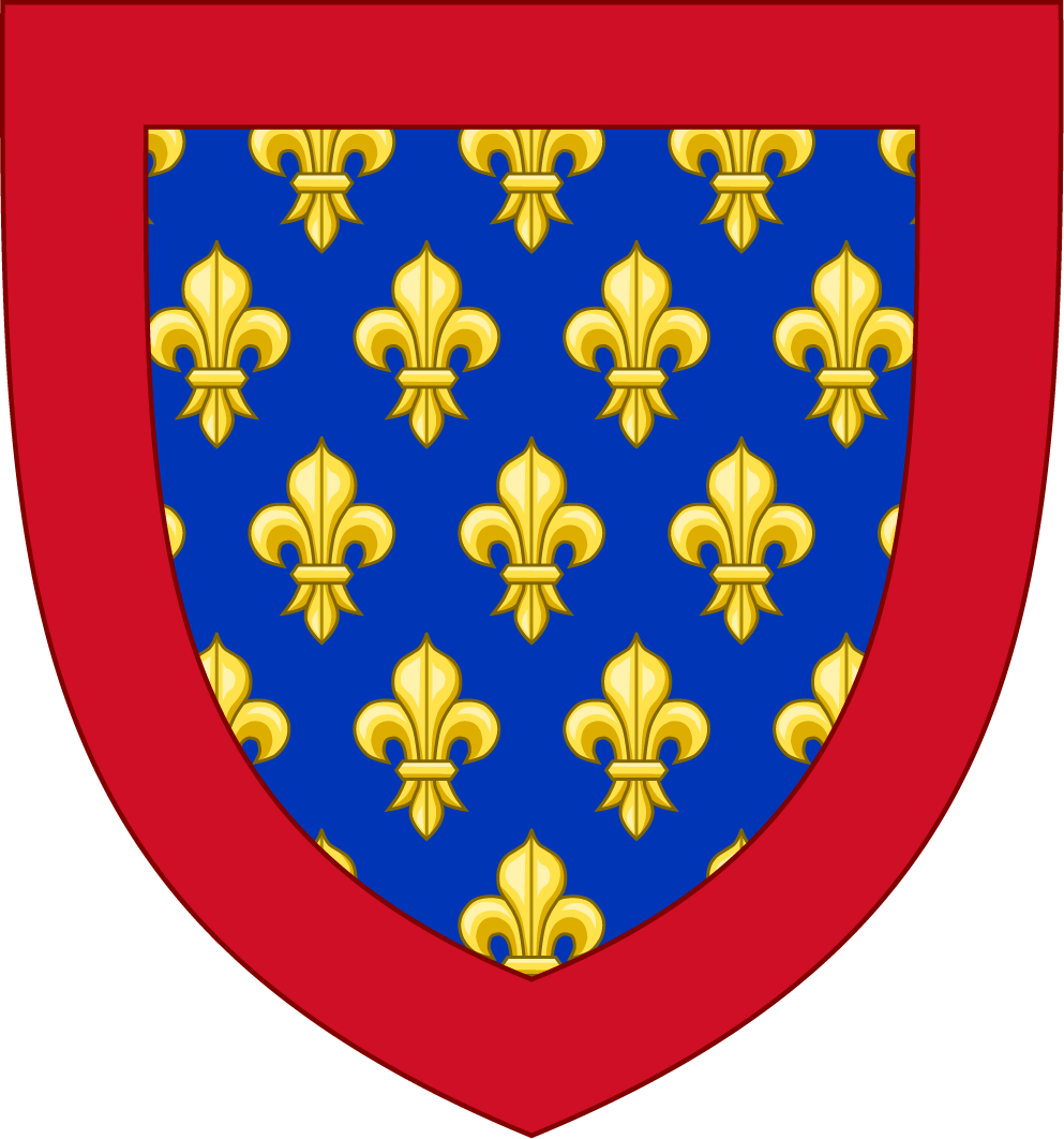 Blason de Jean de Valois, fils de Louis IX.